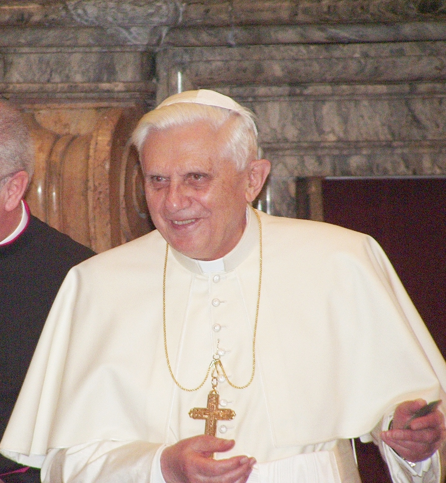 Pope Benedictus XVI at a private audience (january,20 - 2006)